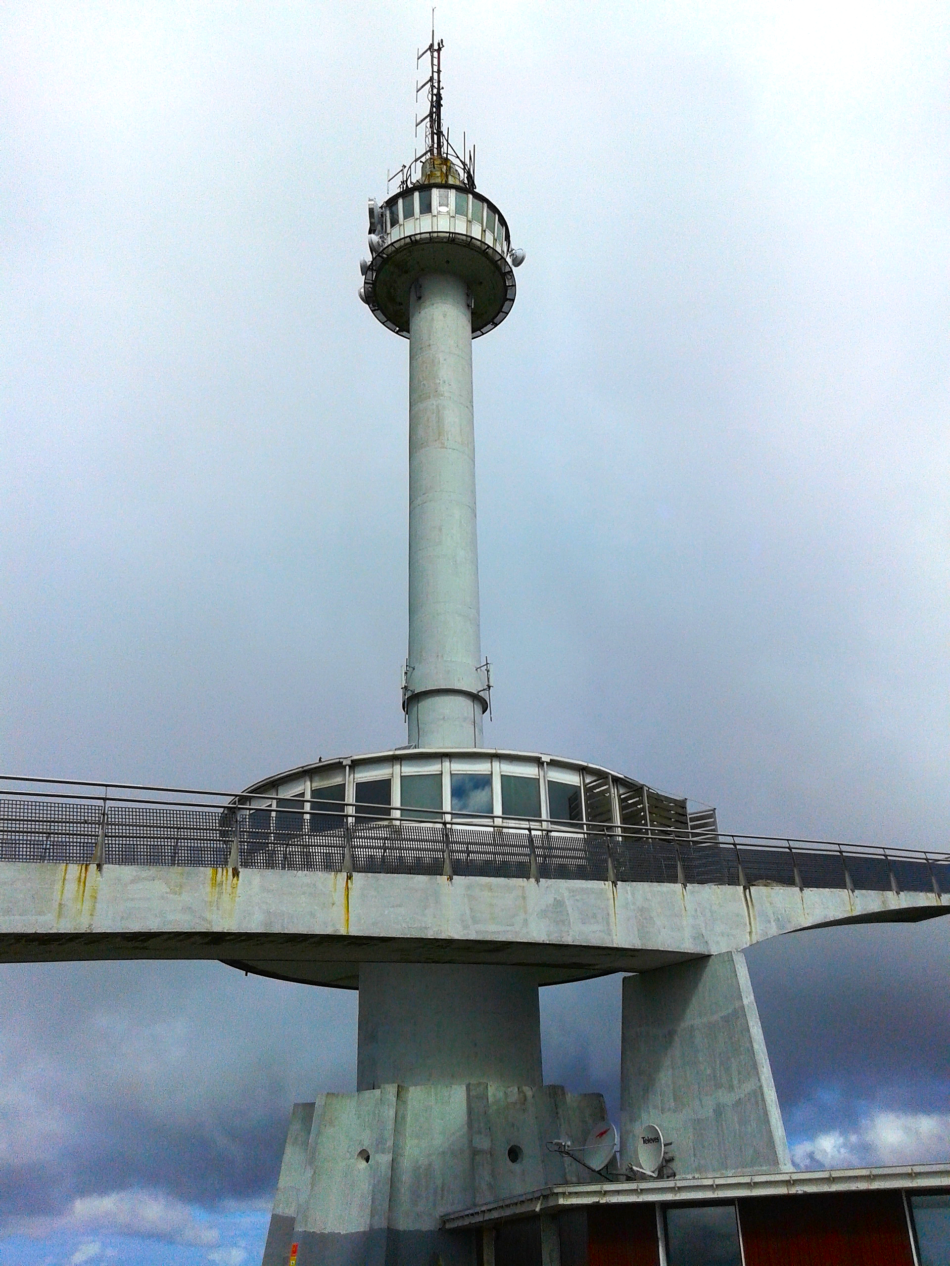 El Monumento al Indiano y a la Marina de Castilla se localiza en la cima de la Peña Cabarga (Cantabria - España). Fue inaugurado el 8 de julio de 1968, bajo el diseño del arquitecto Ángel Hernández Morales y del ingeniero de caminos José Calavera Ruiz. El edificio consiste en una torre, con una sala circular en su base, a la que se accede mediante una estructura tipo puente.